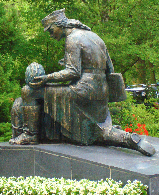 Pomnik Sanitariuszki w Kołobrzegu